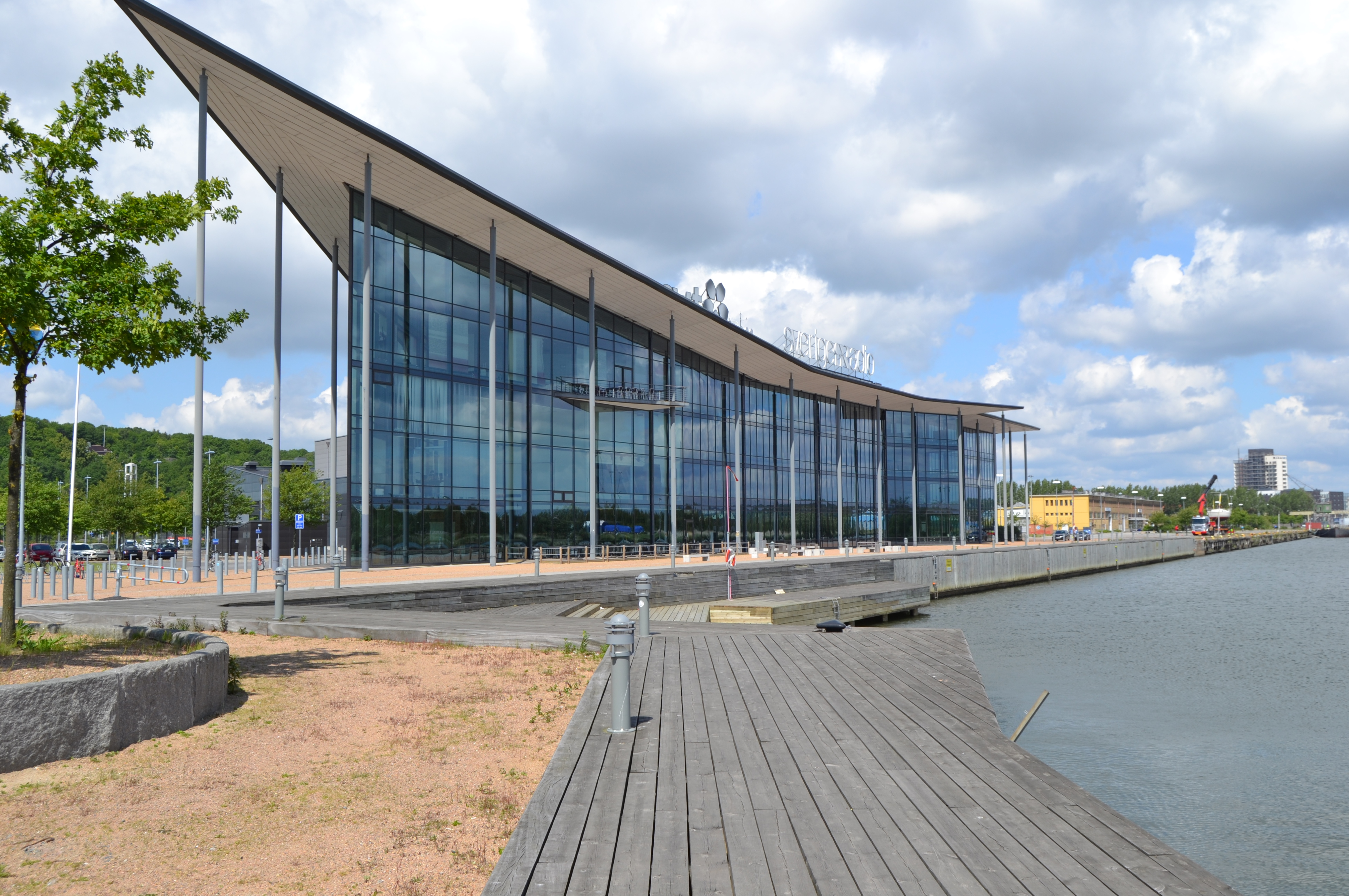 TV Huset före detta Hasselbladshuset vid Lundbyhamnen